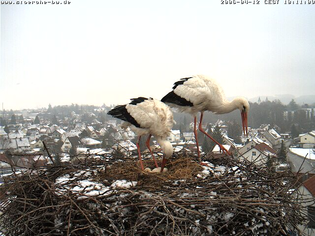 Schnappschuss der Webcam auf dem Bad Waldseeer Storchennest